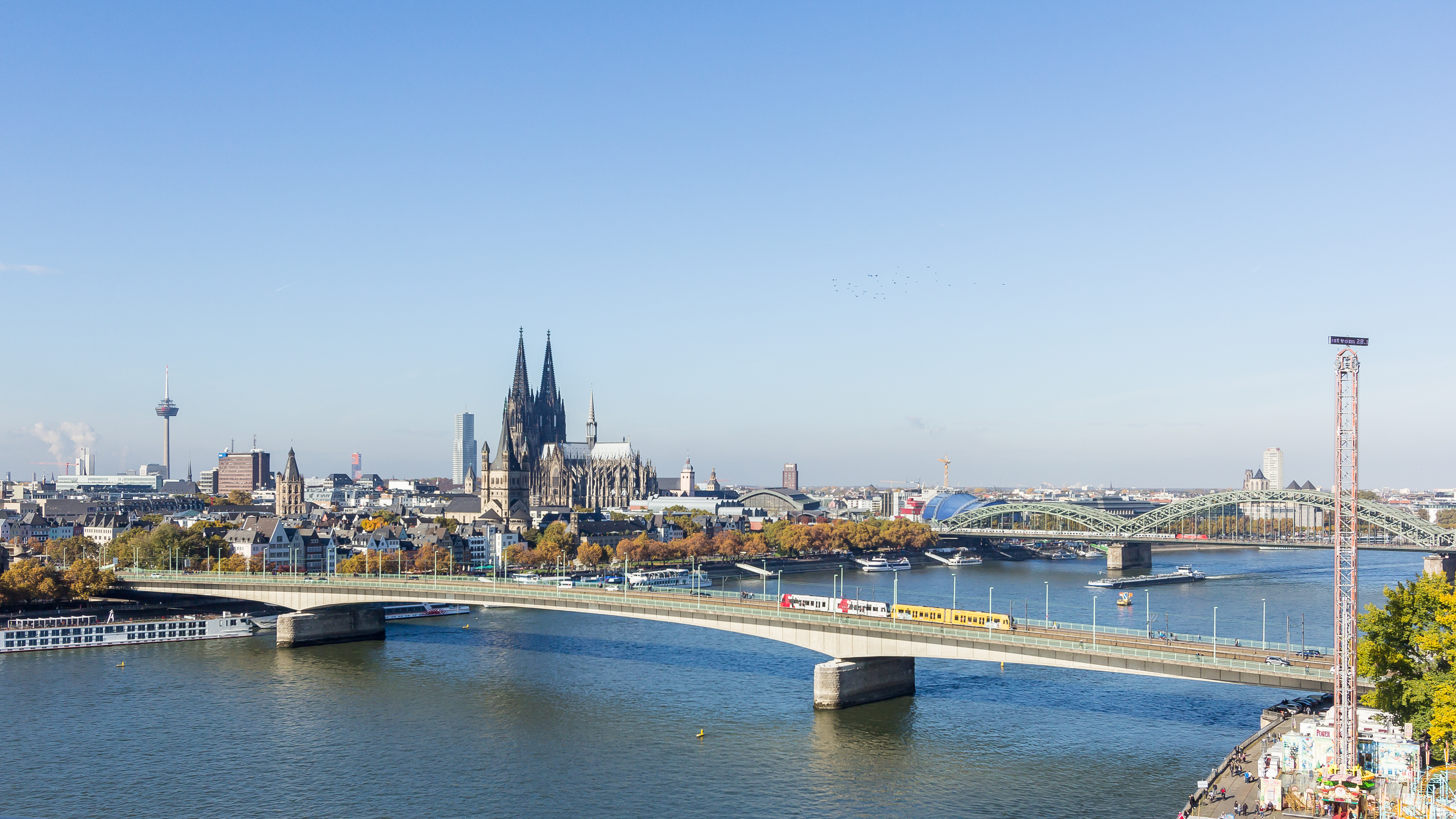 Deutzer Brücke und Kölner Dom